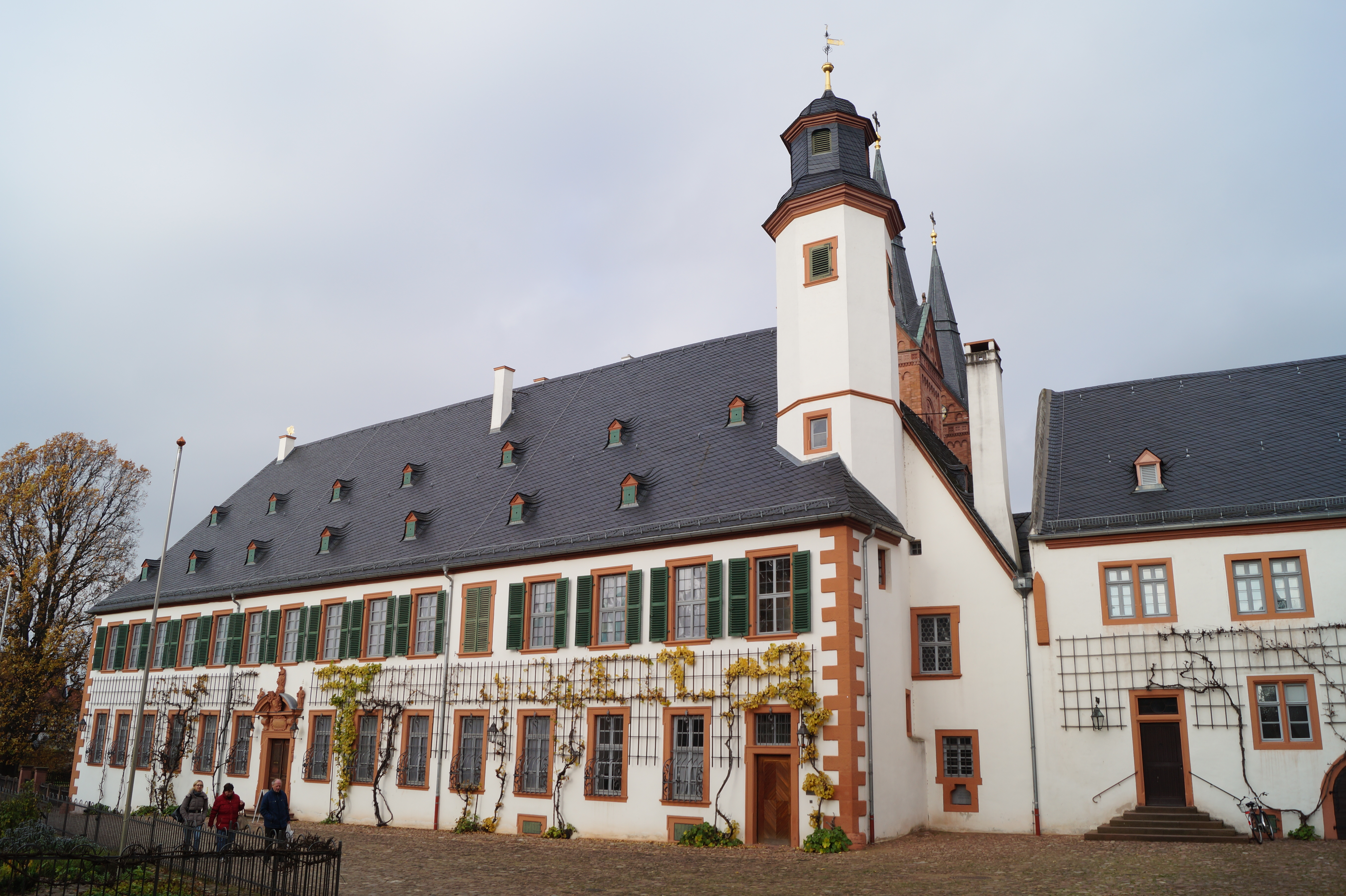 Ehemalige Benediktinerabtei St. Marcellinus und Petrus in Seligenstadt im Landkreis Offenbach (Hessen/Deutschland), Prälatur von 1699